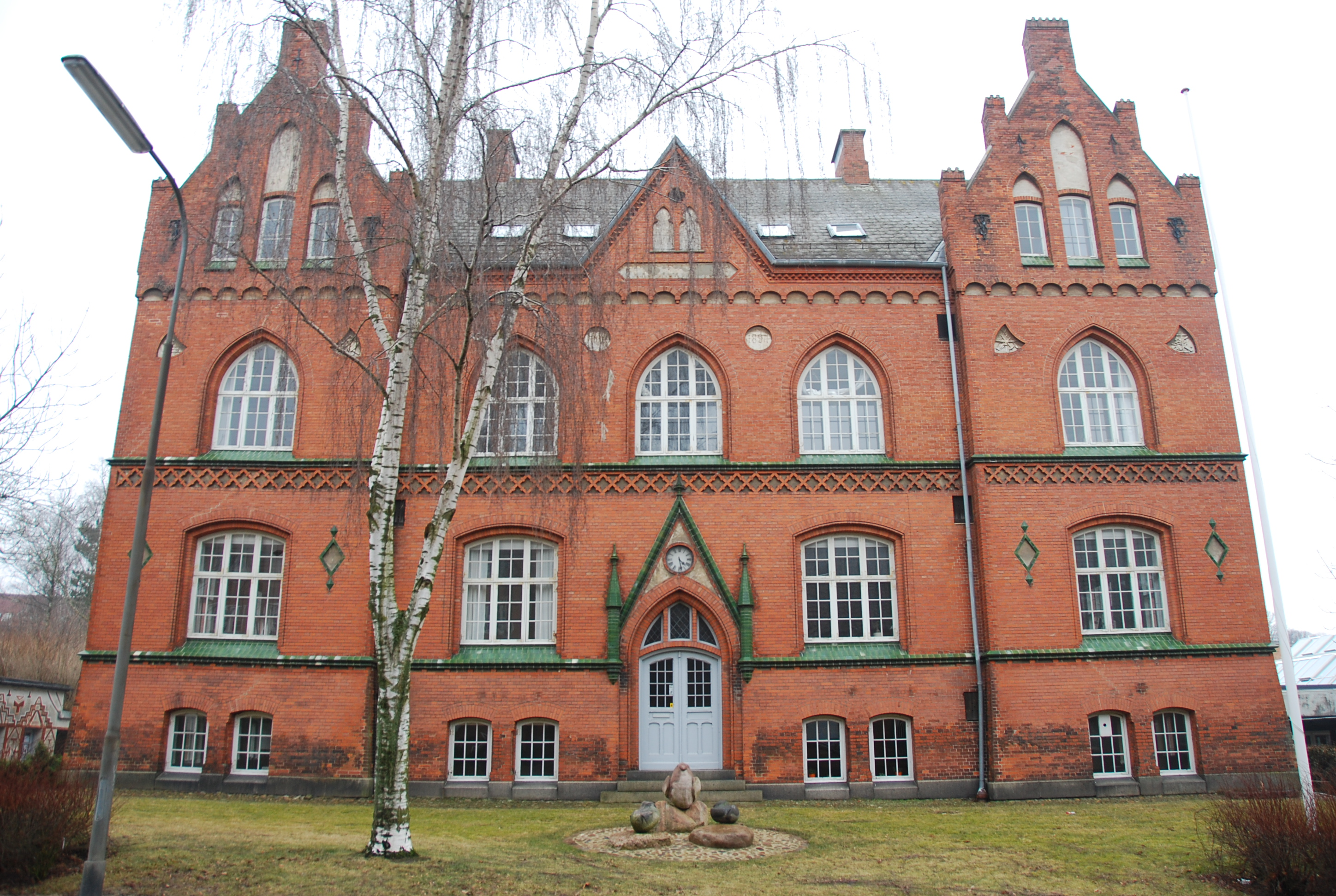 Bygning opført i 1894-95 i Reberbanen i Viborg, og husede indtil 1969 Viborg Tekniske skole. I dag bliver den benyttet af Viborg Ungdomssskole.